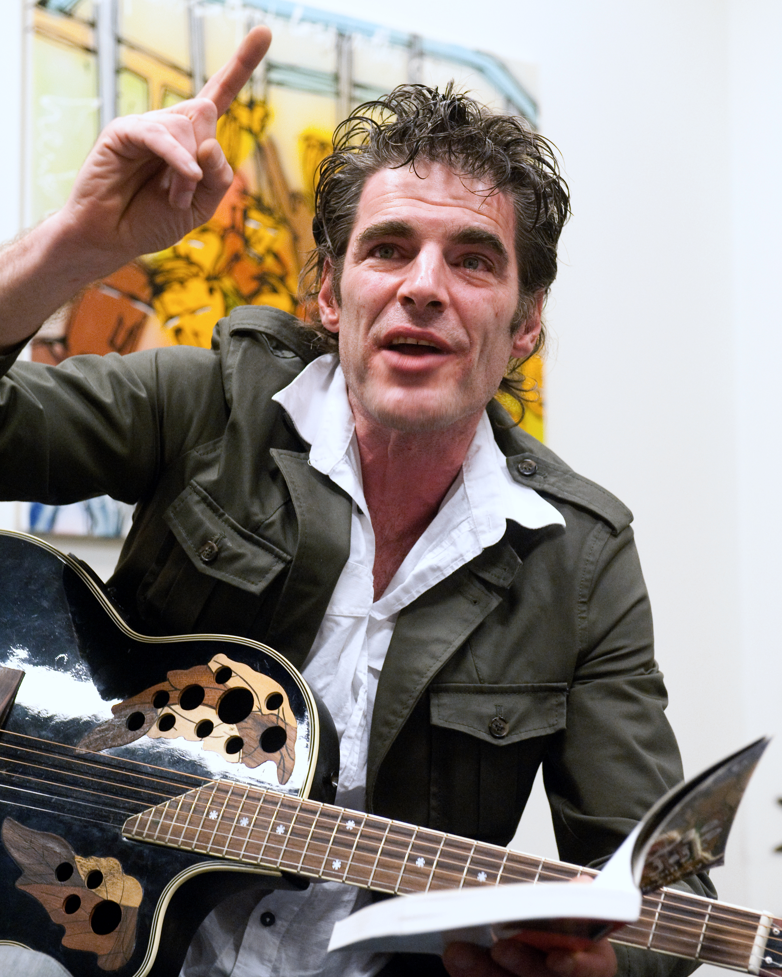 zaterdagavond is de galerie van de Amsterdamse kunstschilder Henk Veen op het Rembrandtplein feestelijk geopend. Dit met medewerking van Ernst Löw, Dave (Ciske de rat) Dekker, Rocks, 'D Tuniz, Ace THC, RTS en Appie Alberts.